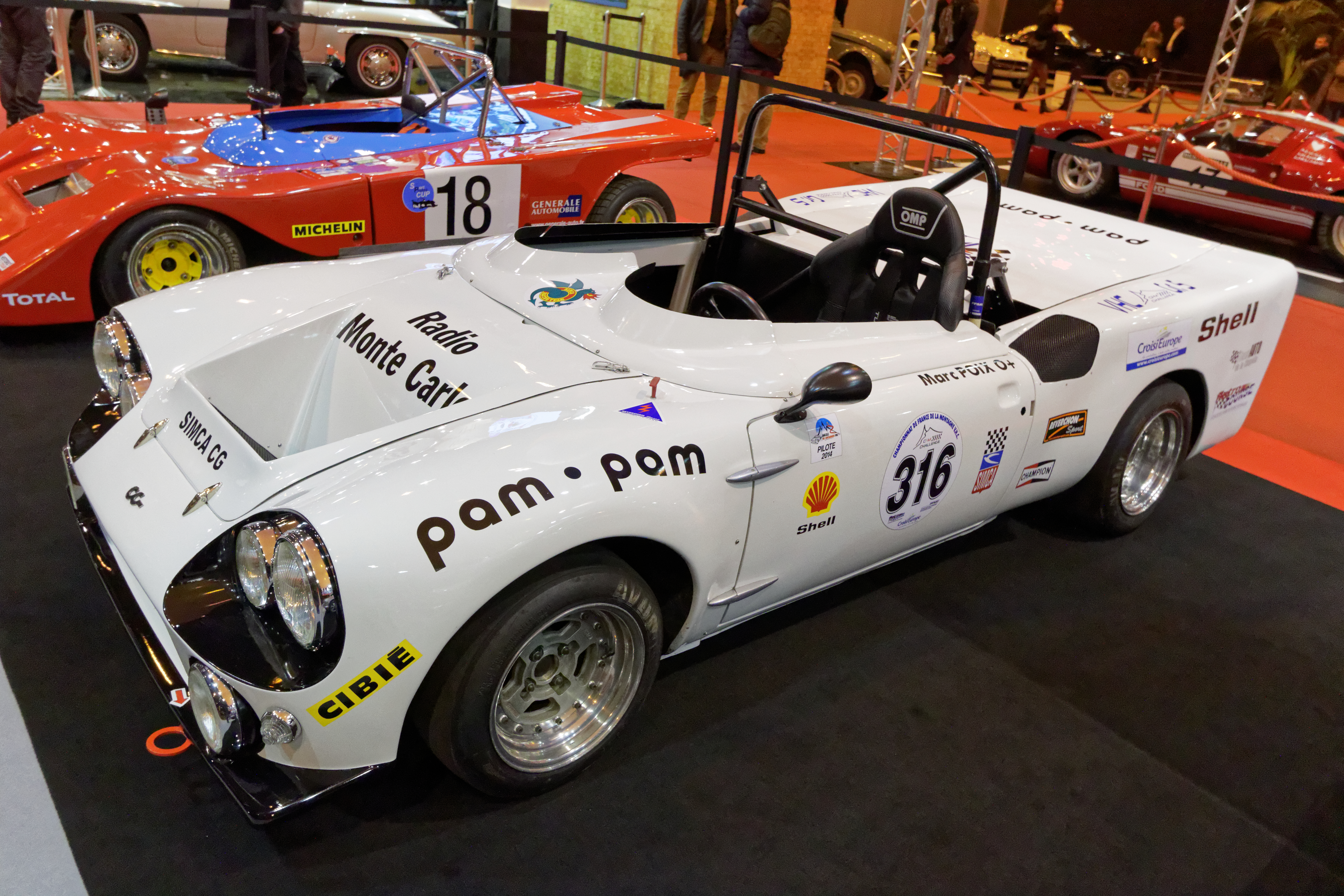 Une des voiture présentée lors du salon Rétromobile de Paris 2015